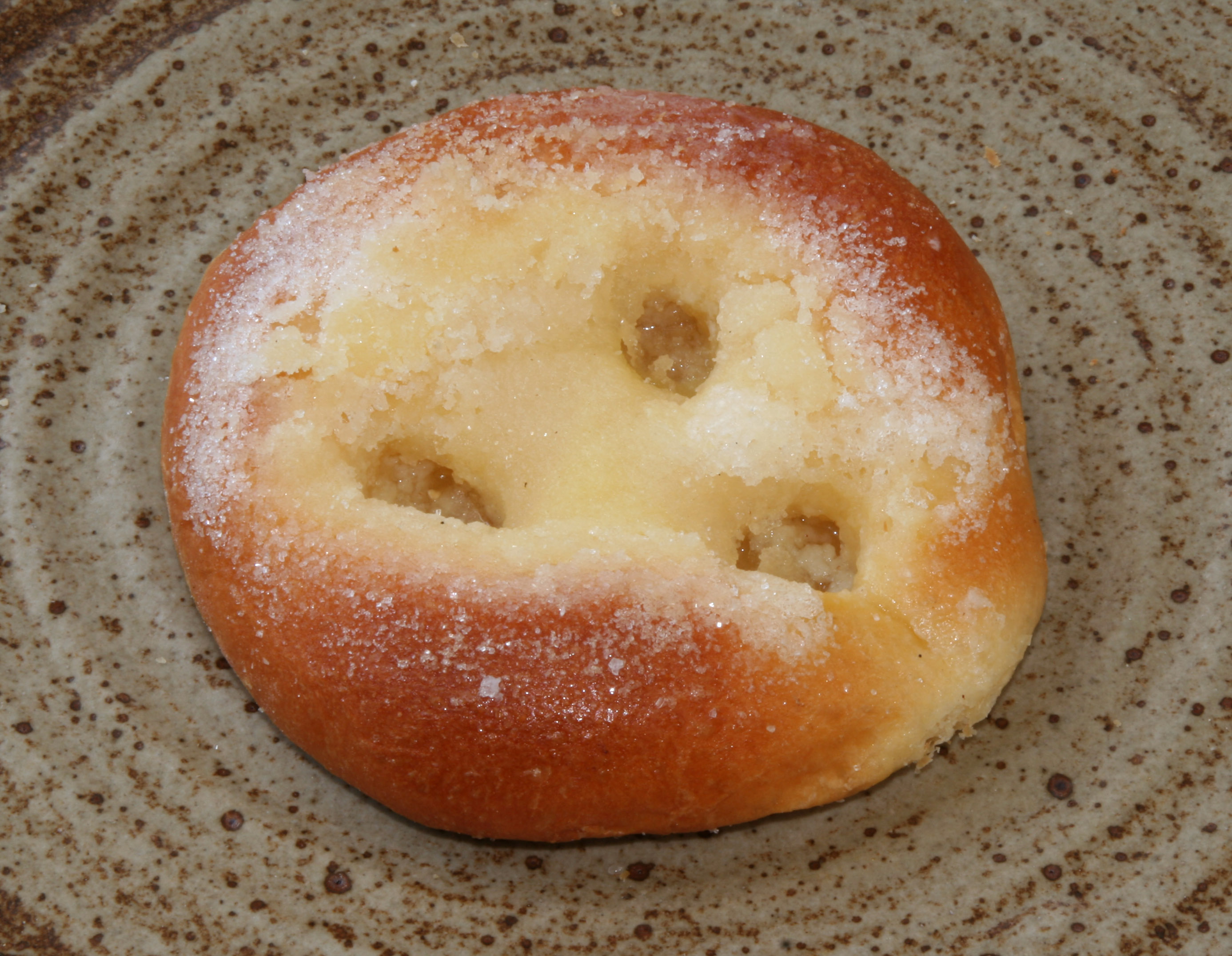 Schuedi-Kaffiskichelchen. Vu menger frëndlecher Bäckesch extra fir d'Wikipedia zur Verfügung gestallt!!